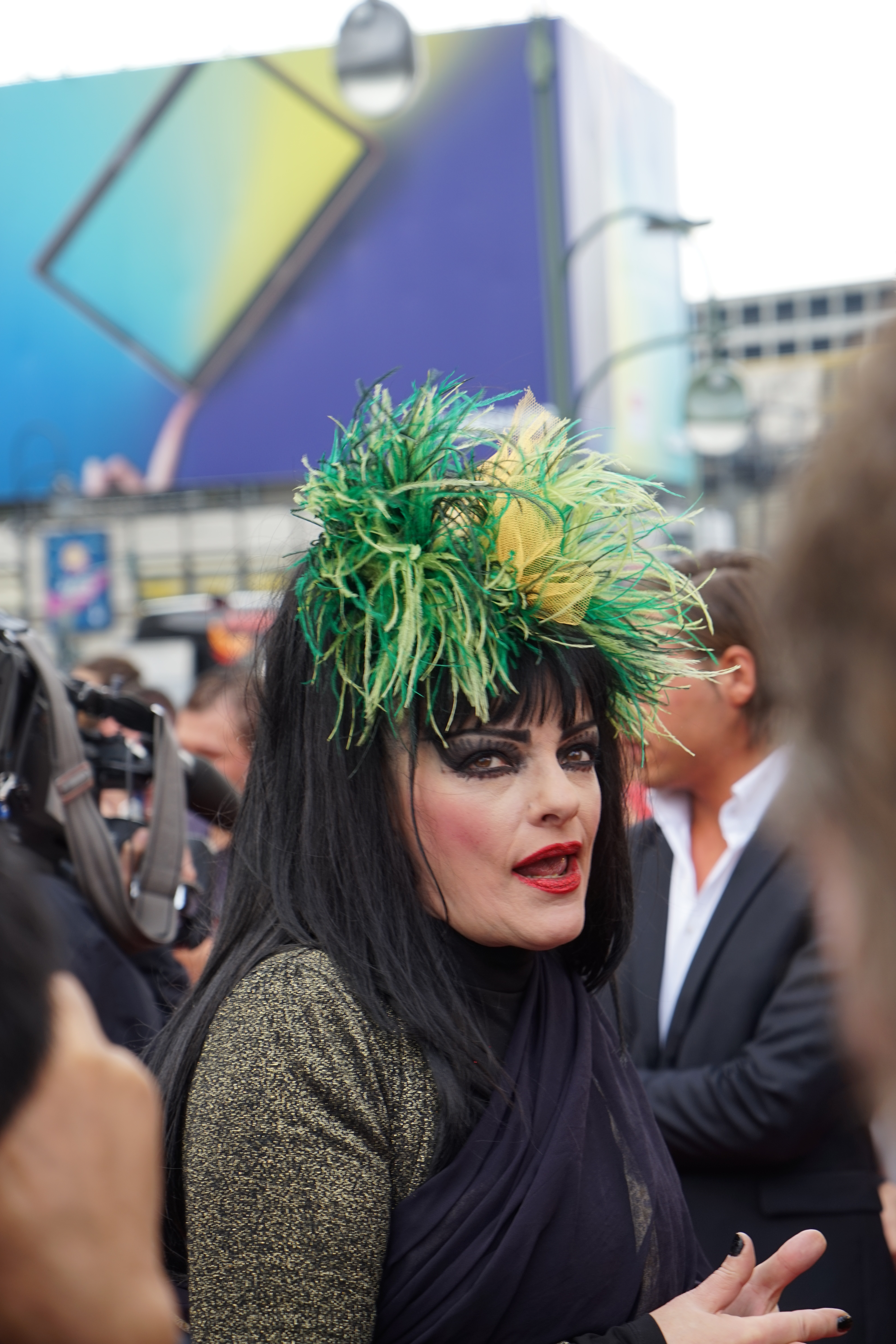 Nina Hagen auf der Premiere des Films "Der Siebte Zwerg" am 21. September 2014